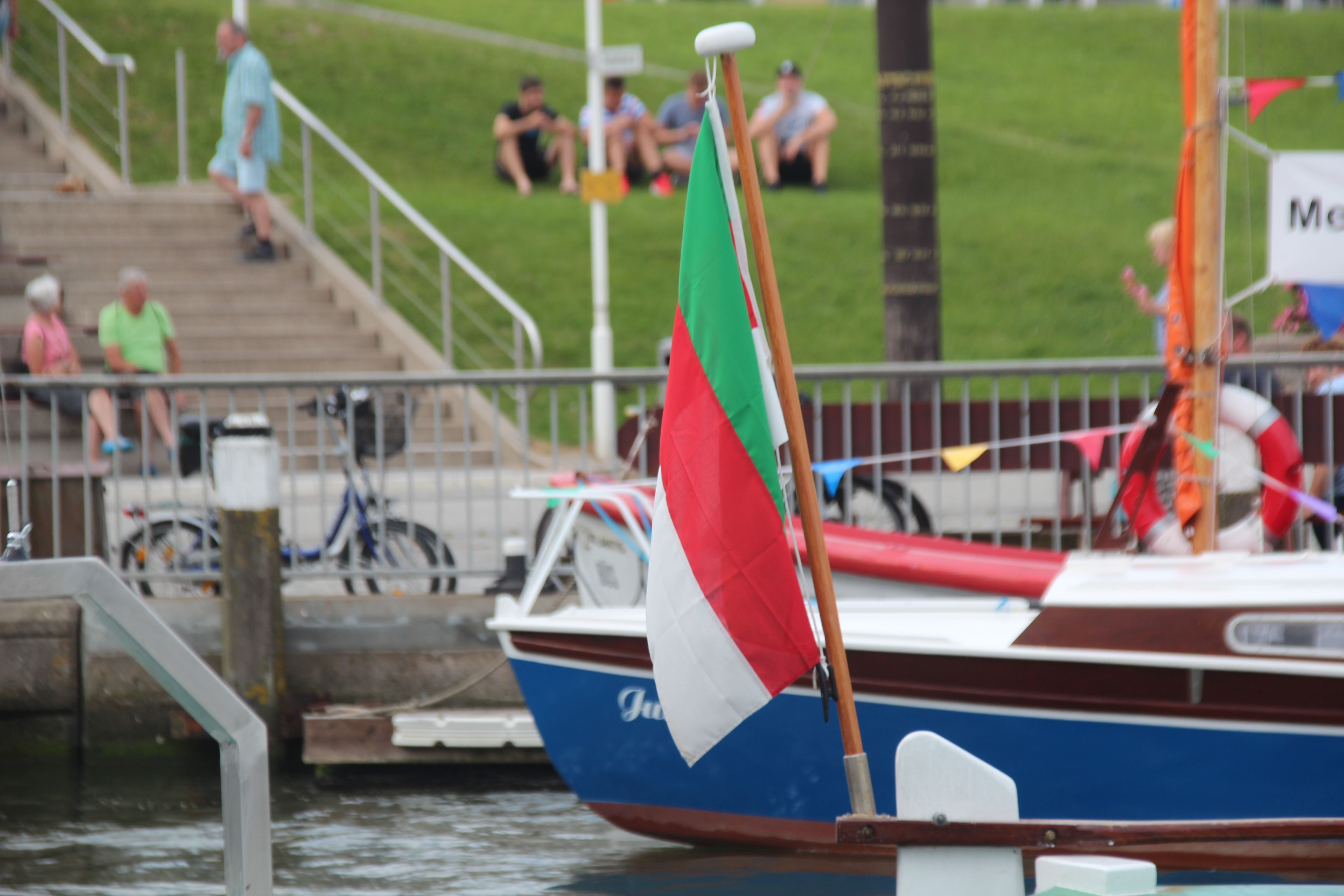 Helgolands trikolor på en båt i Büsum havn.